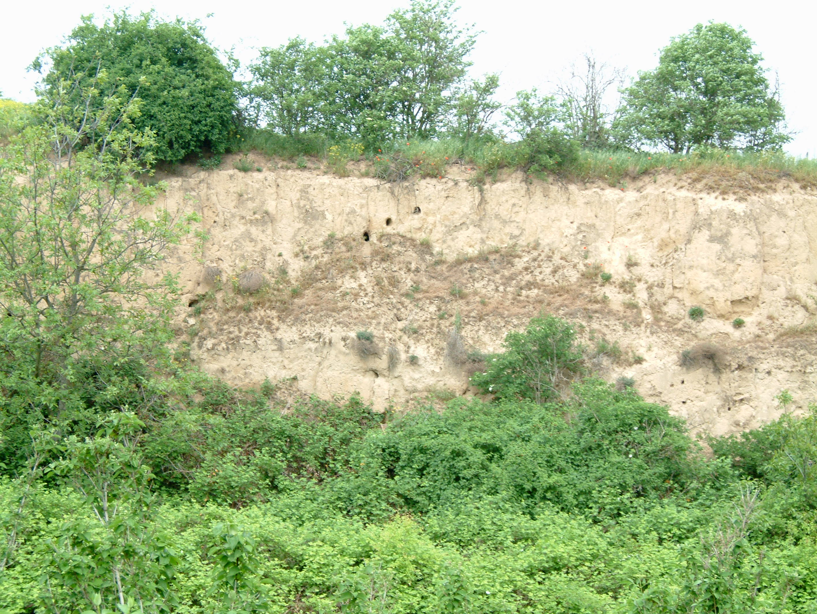 Naturdenkmal Lösswand (Obersülzer Straße) zu Dirmstein